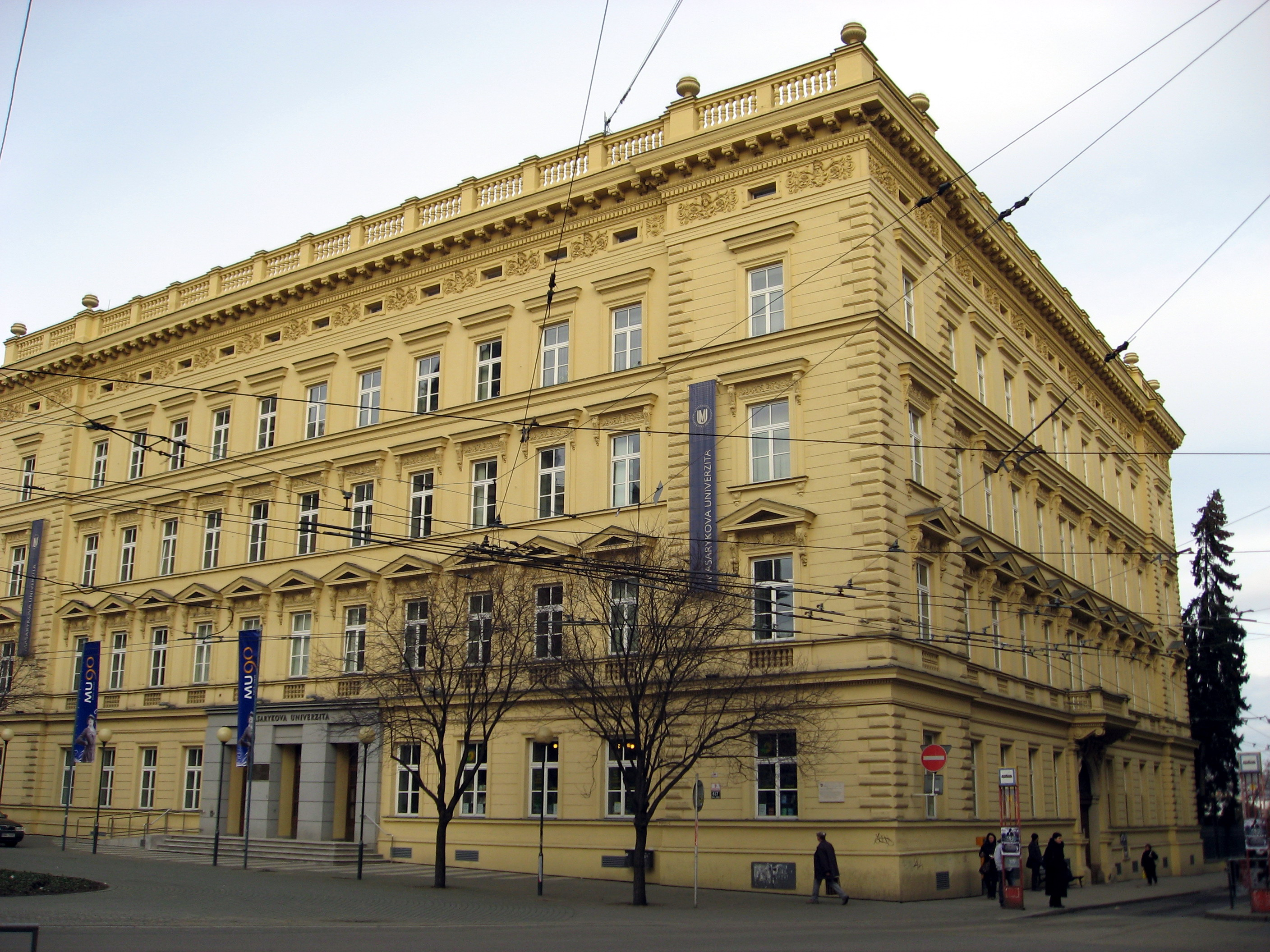 Kounicův palác